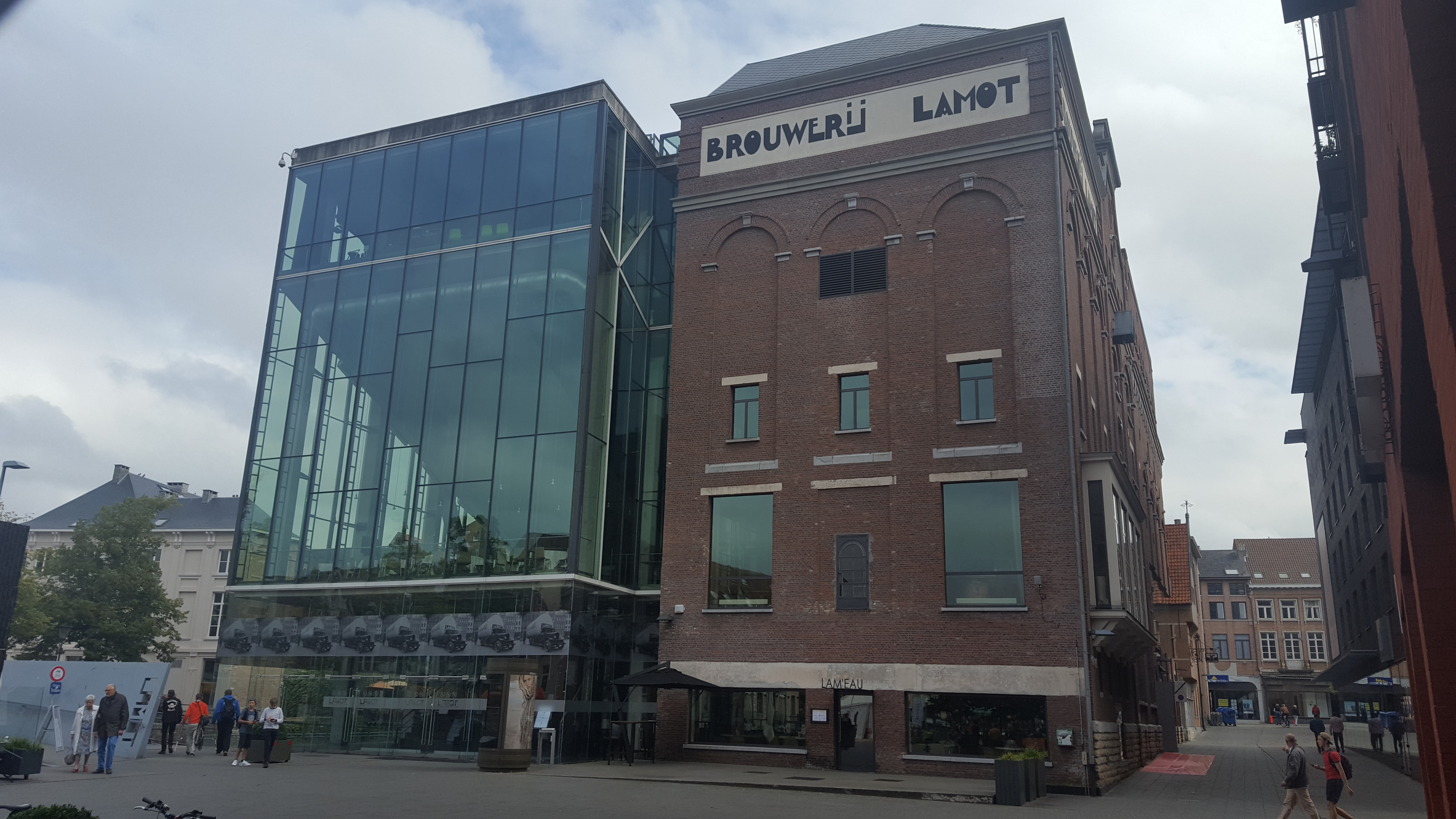 Brouwerij Lamot, Mechelen, België